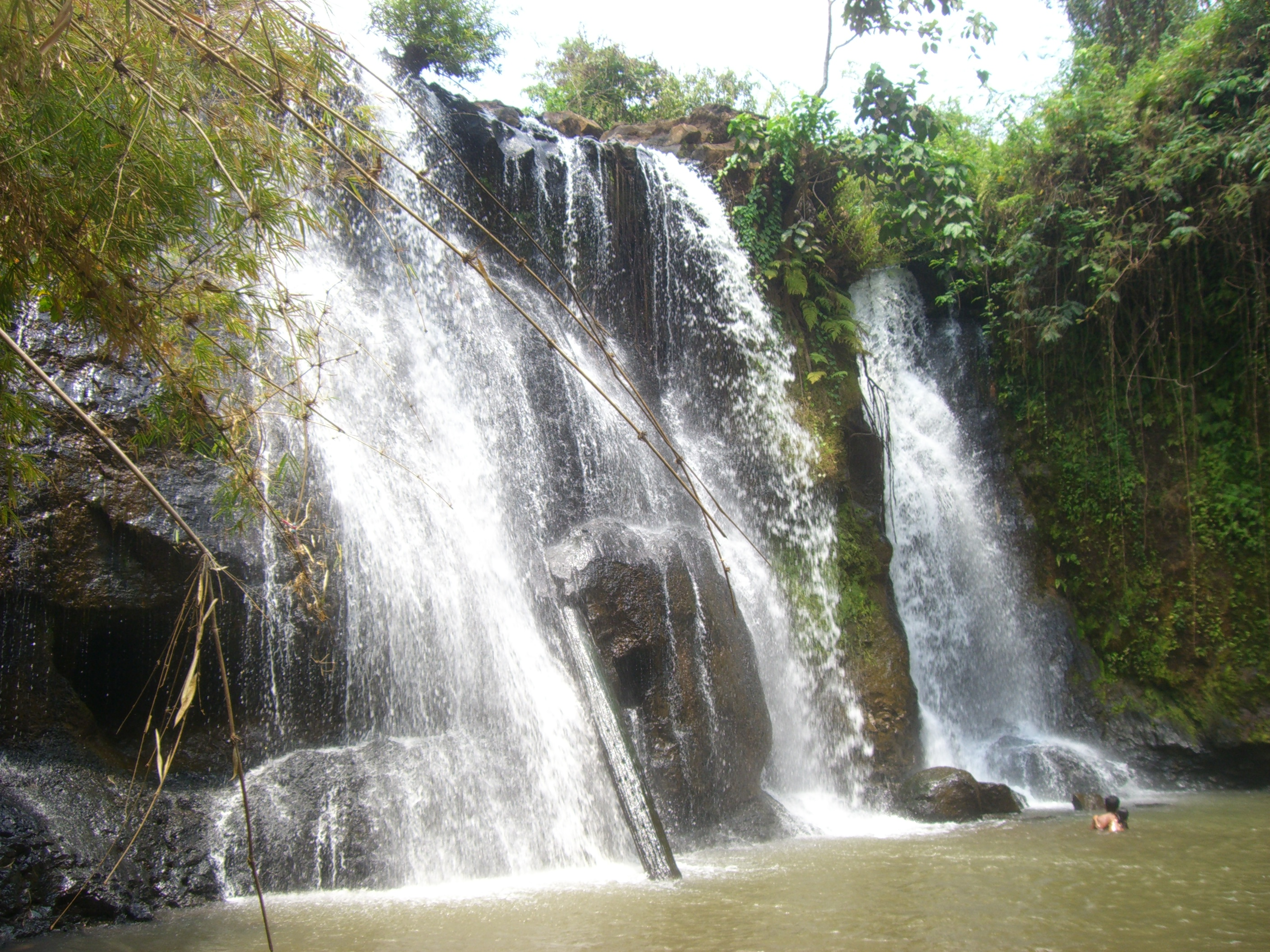 Katieng falls, Ratanakiri, Cambodia